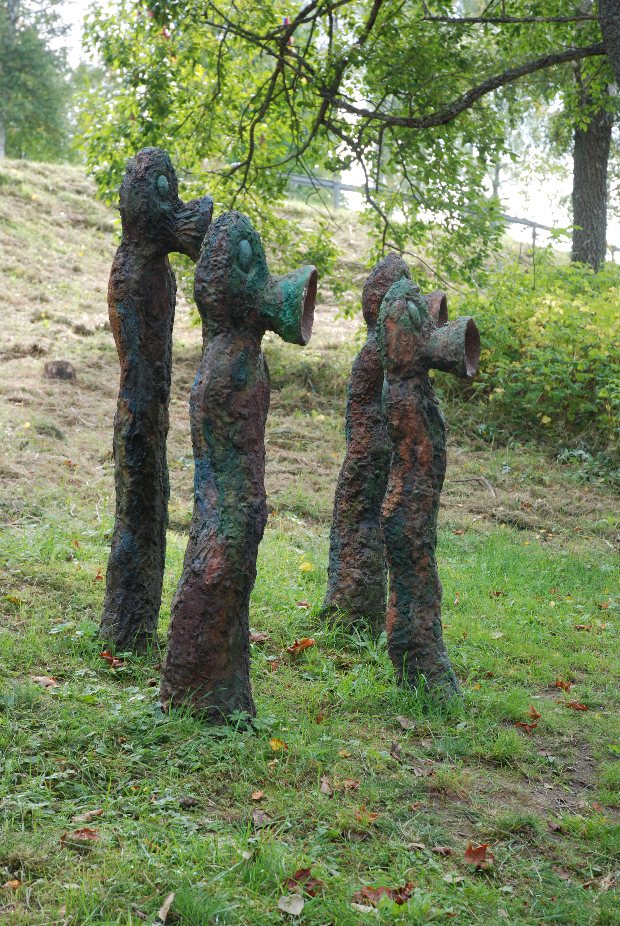 Peter Tillbergs Trattgubbar, Skulpturparken Ängelsberg (Ängelsberg Sculpture Park), Ängelsberg, Sweden